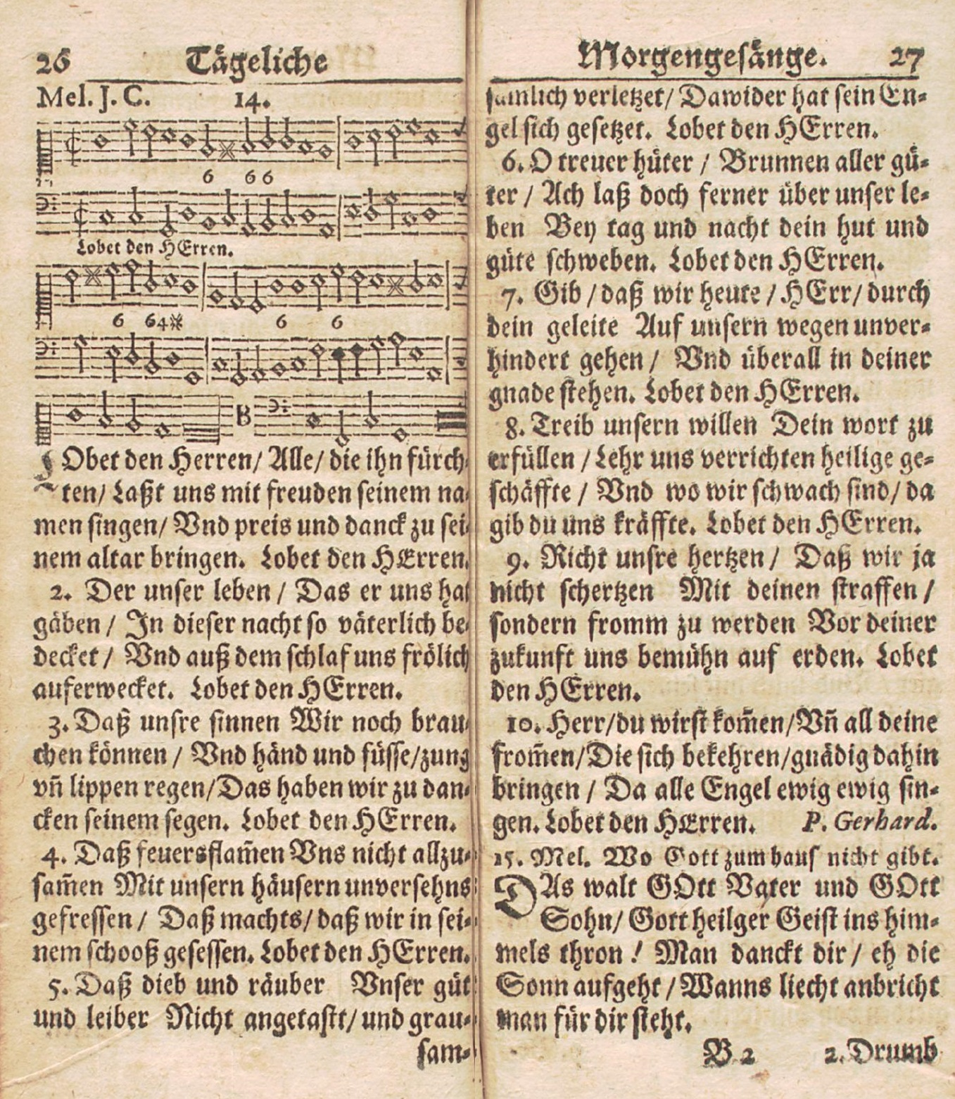 Lobet den Herren in Praxis Pietats Melica (Ausgabe 1660)